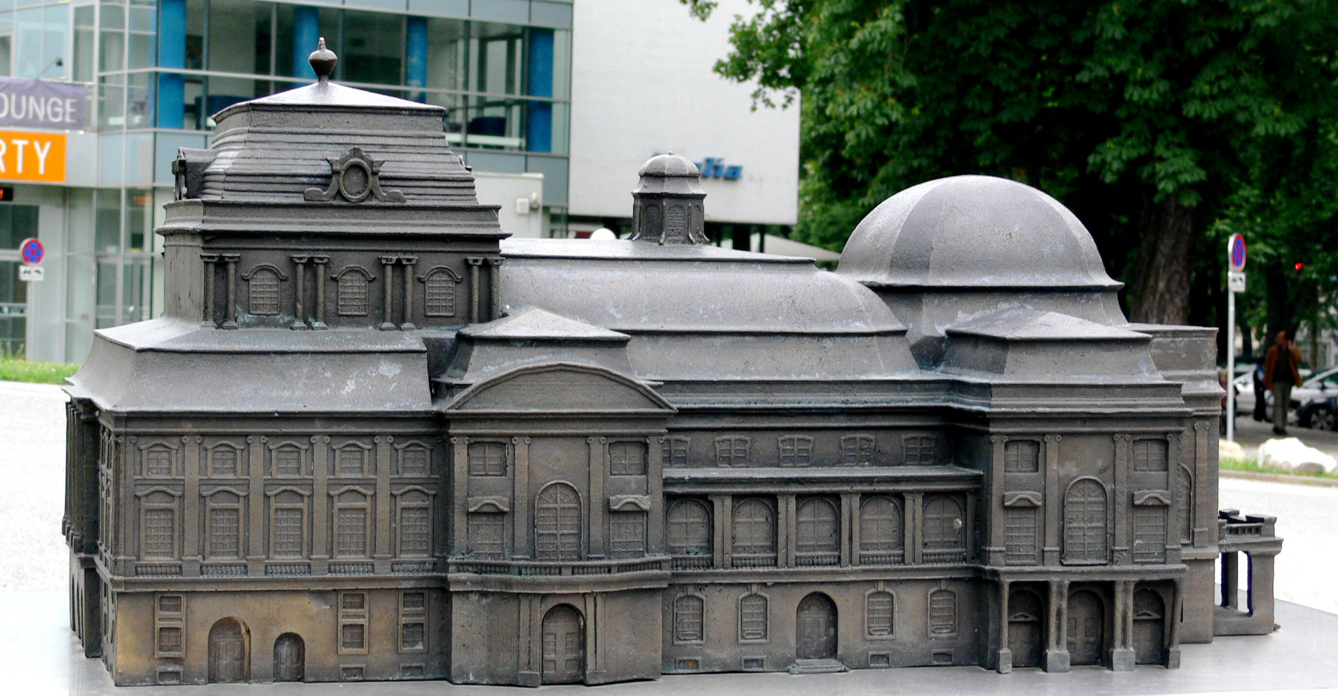 Graz, Modell des Opernhauses, aufgestellt vor dem Opernhaus